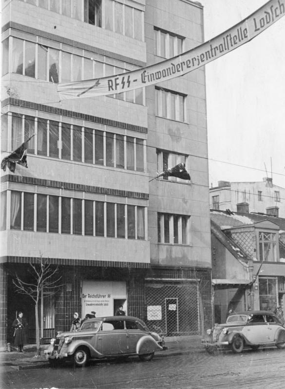 Litzmannstadt, Einwanderer-Zentralstelle Nord-Ost Die Einwanderer-Zentralstelle Nord-Ost in Litzmannstadt [Polen, Litzmannstadt.- Gebäude der Einwanderer-Zentralstelle Nord-Ost, Transparent über Straße "RFSS - Einwandererzentralstelle Lodsch"] Information added by Wikimedia users.